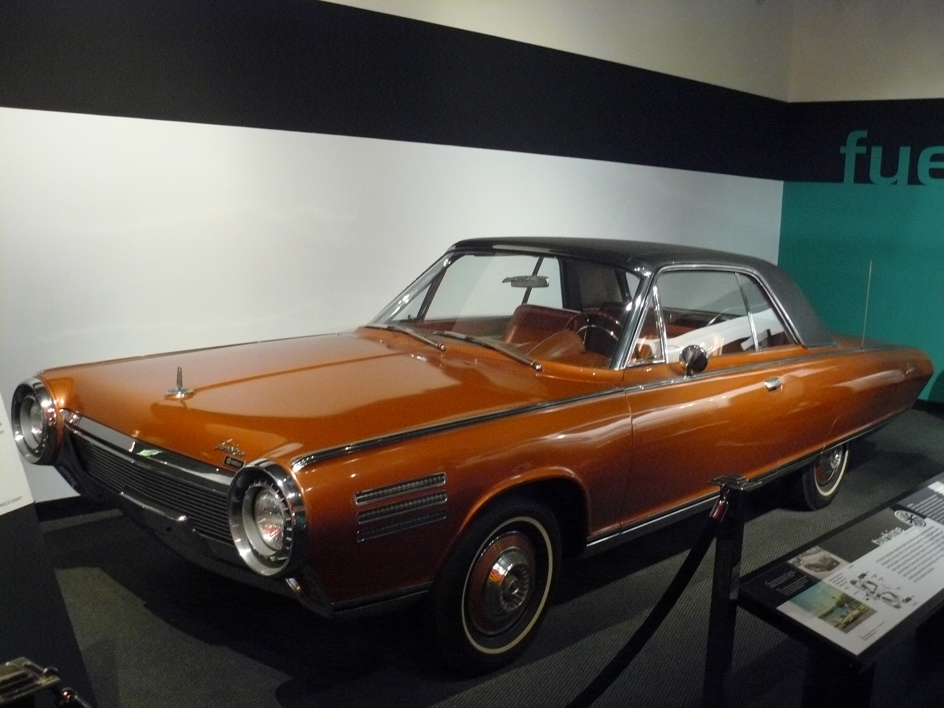 Musée Petersen Septembre 2012